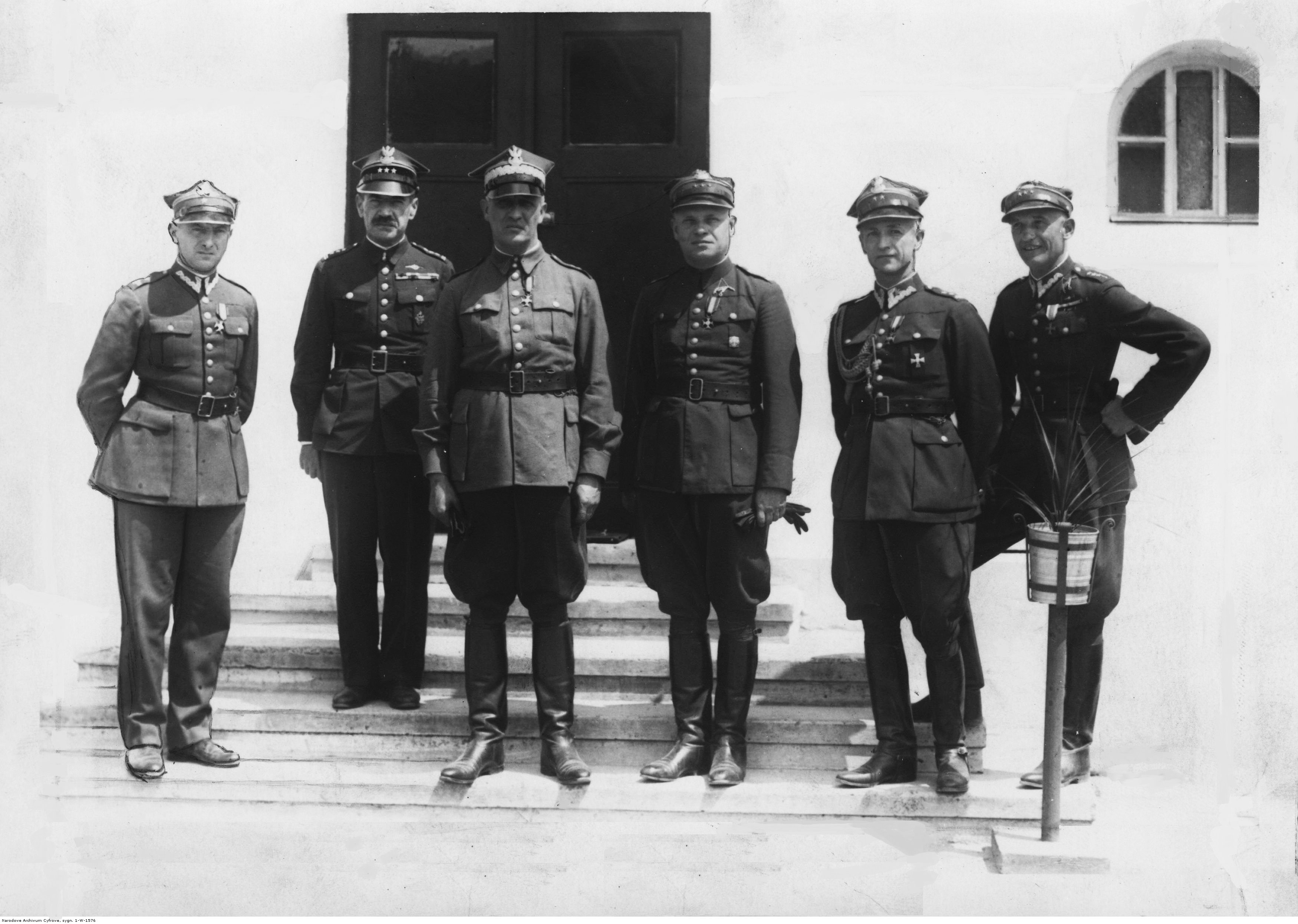 Wizyta gen. Gustawa Orlicz-Dreszera w 2 pułku lotniczym w Krakowie. Gen. Gustaw Orlicz-Dreszer (3 z lewej) w otoczeniu dowództwa pułku przed wejściem do kasyna oficerskiego. Widoczni również m.in. płk Edward Lewandowski (3 z prawej), ppłk Stefan Loth (2 z prawej), kpt. Aleksander Łagiewski (1 z prawej).